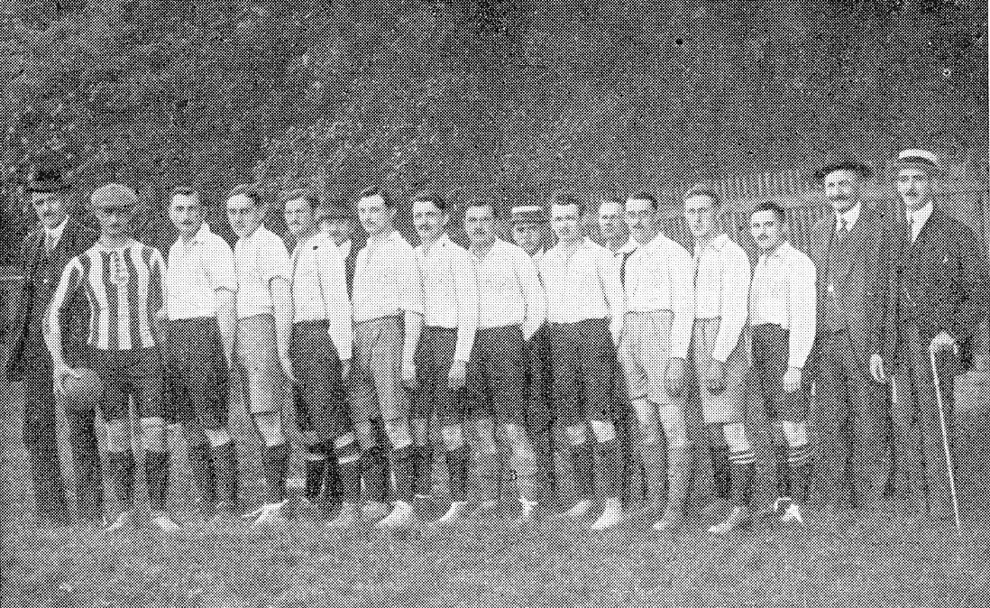 Die Mannschaft des SC Wacker Wiens, um 1909